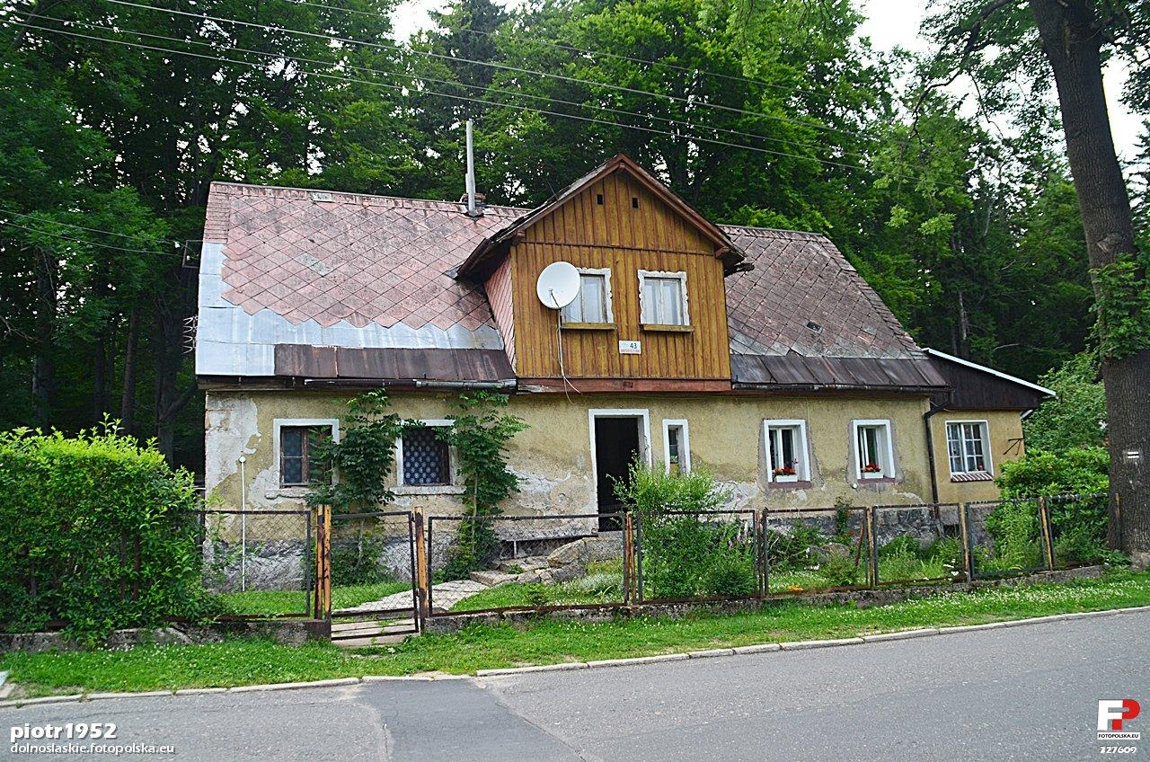 Bez zmian popada w ruinę ul 1 maja 43